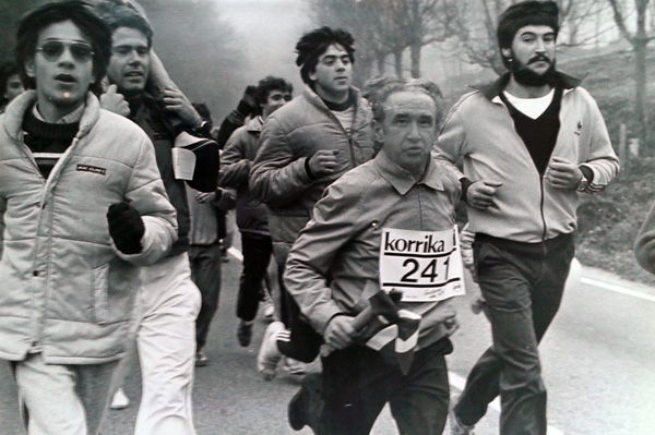 Jimeno Jurio historialari nafarra 1983ko Korrikan